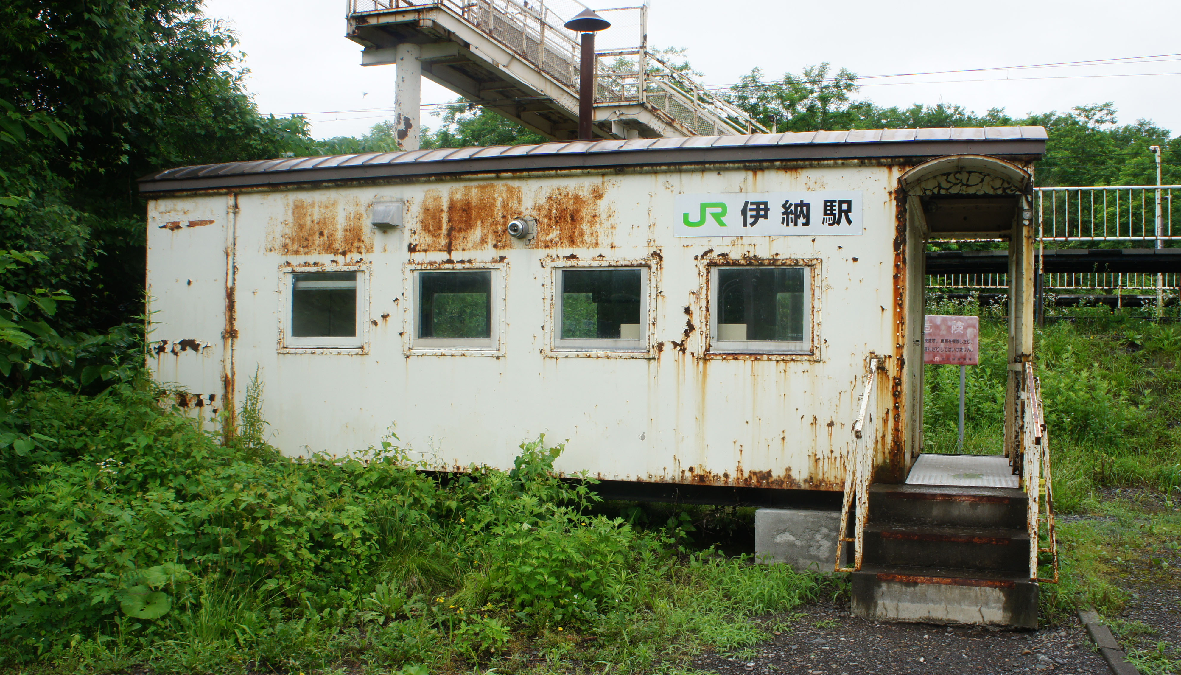 JR函館本線・伊納駅の駅舎 Sony NEX-3